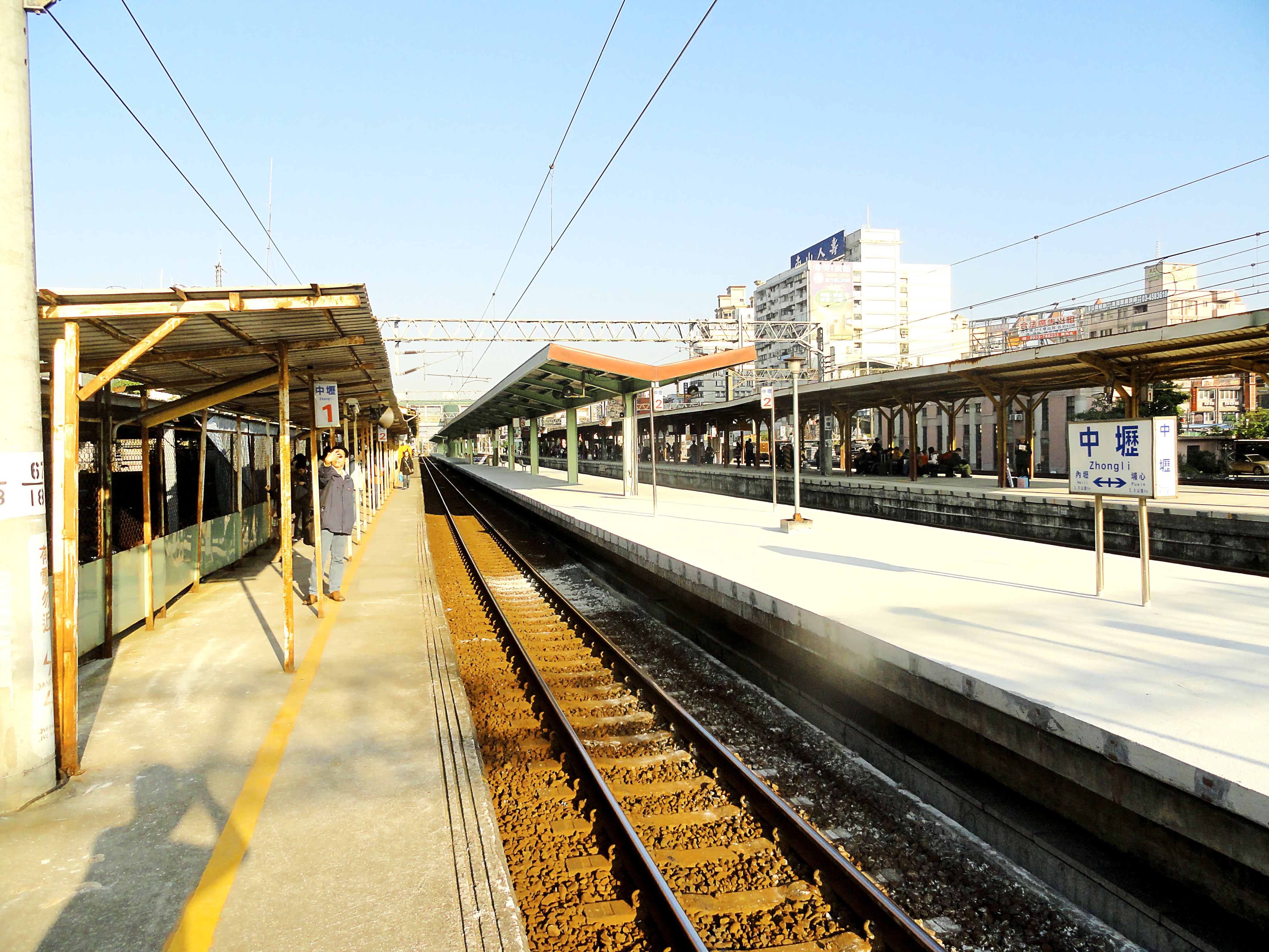 中文（中国大陆）: 中坜车站的月台